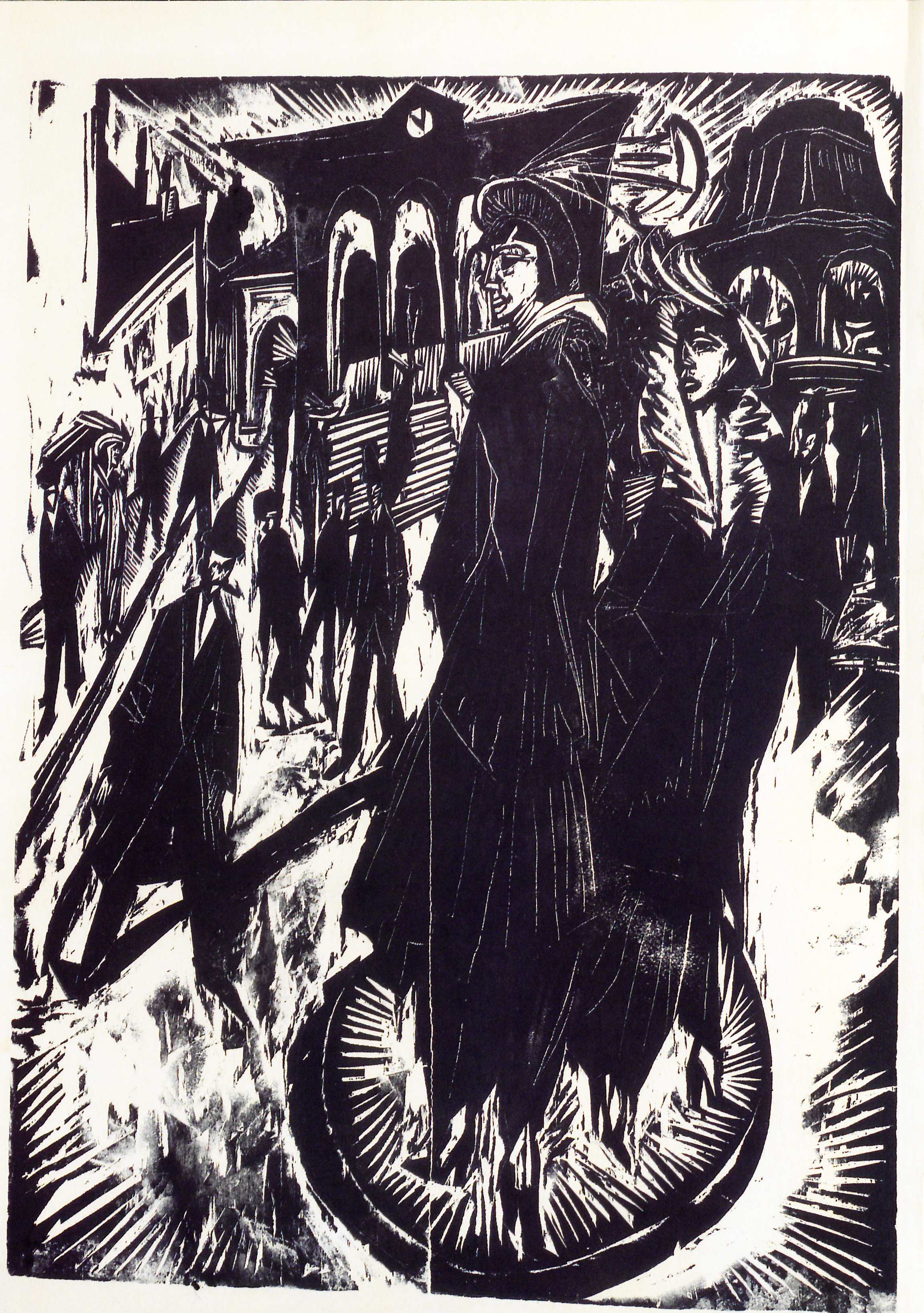 Ernst Ludwig Kirchner Frauen am Potsdamer Platz Holzschnitt 1914